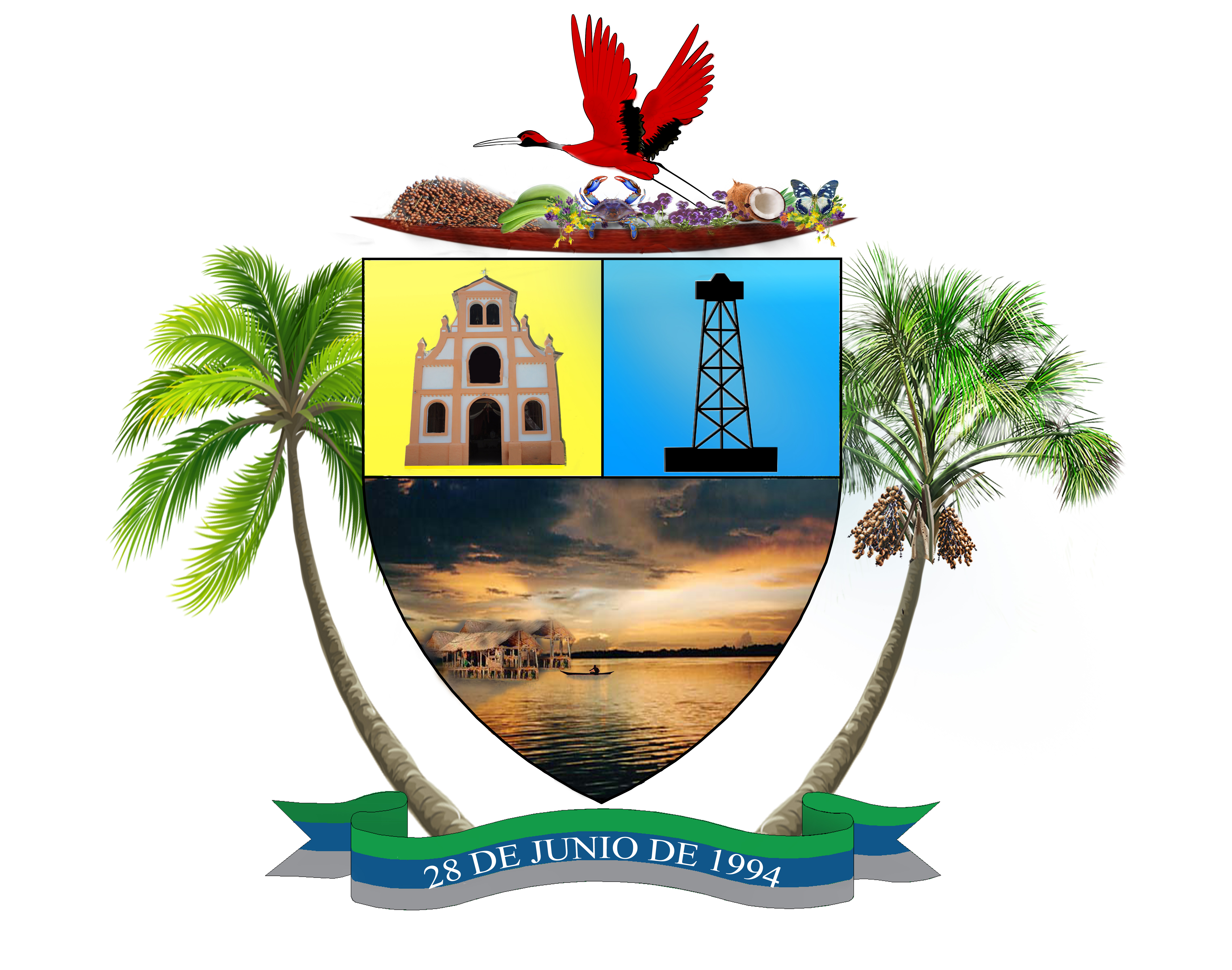 Esta constituido por un espacio de media ojiva con base superior, dividido en tres campos, delineado en color negro en representación a la riqueza petrolera de Pedernales. El campo izquierdo de color amarillo representa el moriche fuente de nutrición, vestido y amparo del Warao; allí emerge la Iglesia Católica del Santo Cristo de Pedernales, su santo patrón, fundada en el siglo XVIII por misiones capuchinas. En el campo derecho de color azul se denota una imponente torre de extracción petrolera, clave económica del municipio. En el campo inferior a mitad del escudo un imponente atardecer con dos palafitos (vivienda indígena) en su interior chinchorros de fibra del moriche y curiaras como el medio de transporte del Warao. Coronando el escudo una garza roja (picoca) en placido vuelo, ave que abunda en la región; también una curiara rebosada de exóticas flores silvestres de diversos colores, en el centro el apreciado cangrejo azul nutritivo alimento e icono representativo de la región y algunos frutos que son el sustento tradicional como el moriche, coco y plátano. Bordeando el escudo se presenta al margen izquierdo una palmera de coco y a la derecha una palmera de moriche que se entrelazan en la parte inferior del escudo con una cinta del tricolor municipal donde se indica la fecha “28 de Junio de 1994” cuando se designó a Pedernales como Municipio Autónomo.